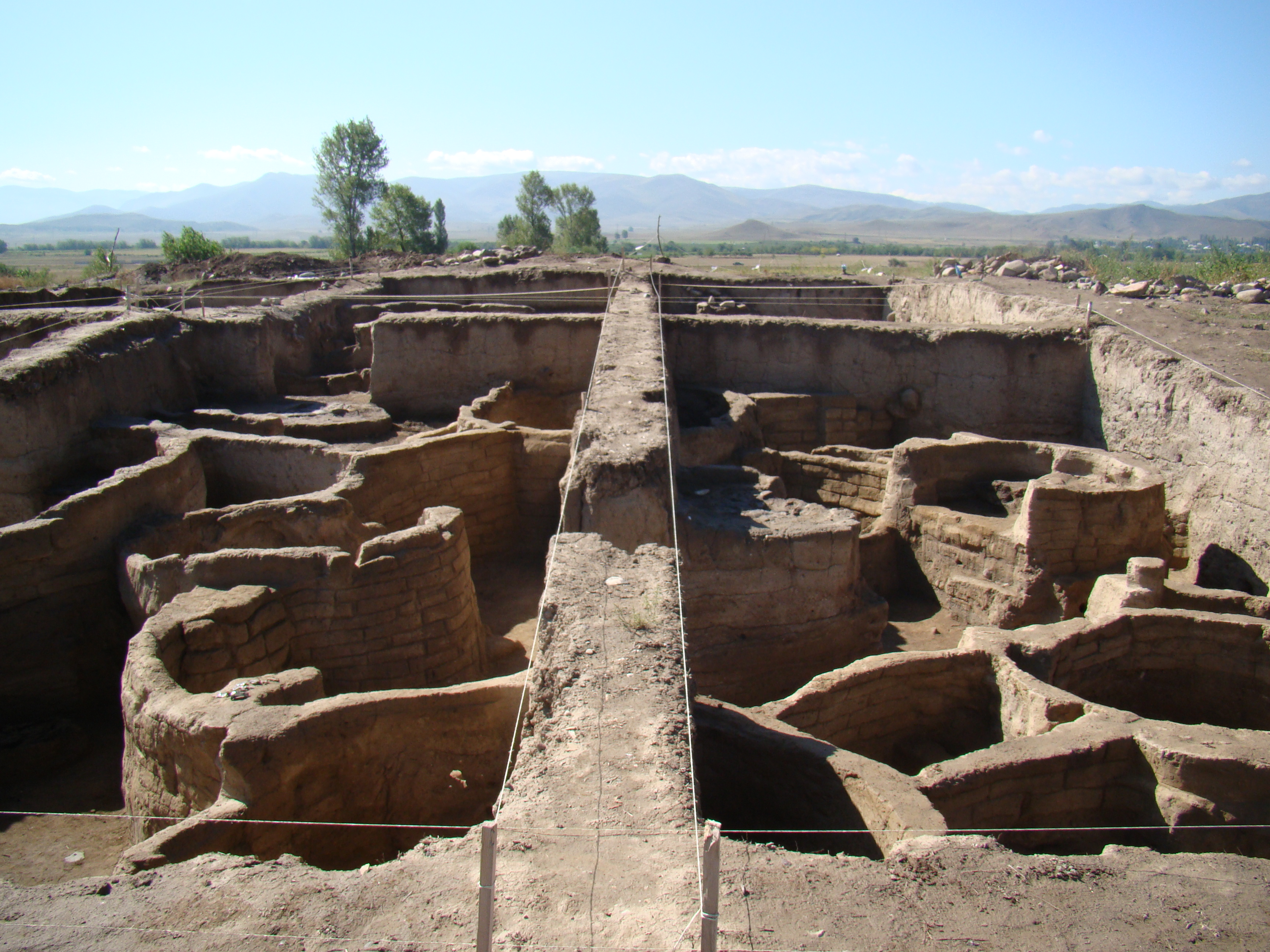 Archeapark in Azerbaijan ( Tovuz city)